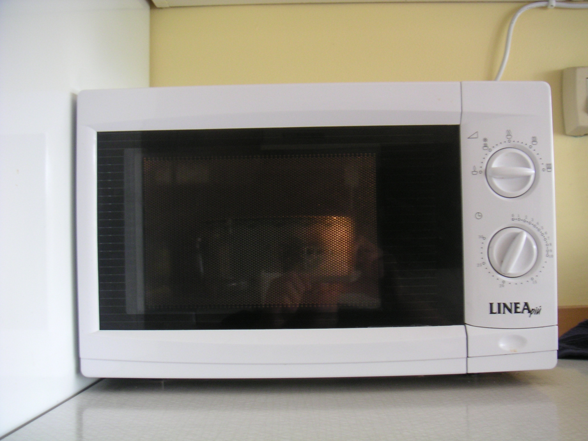 gör vad du vill med den, förutom att hindra någon annan att göra vad den vill med den